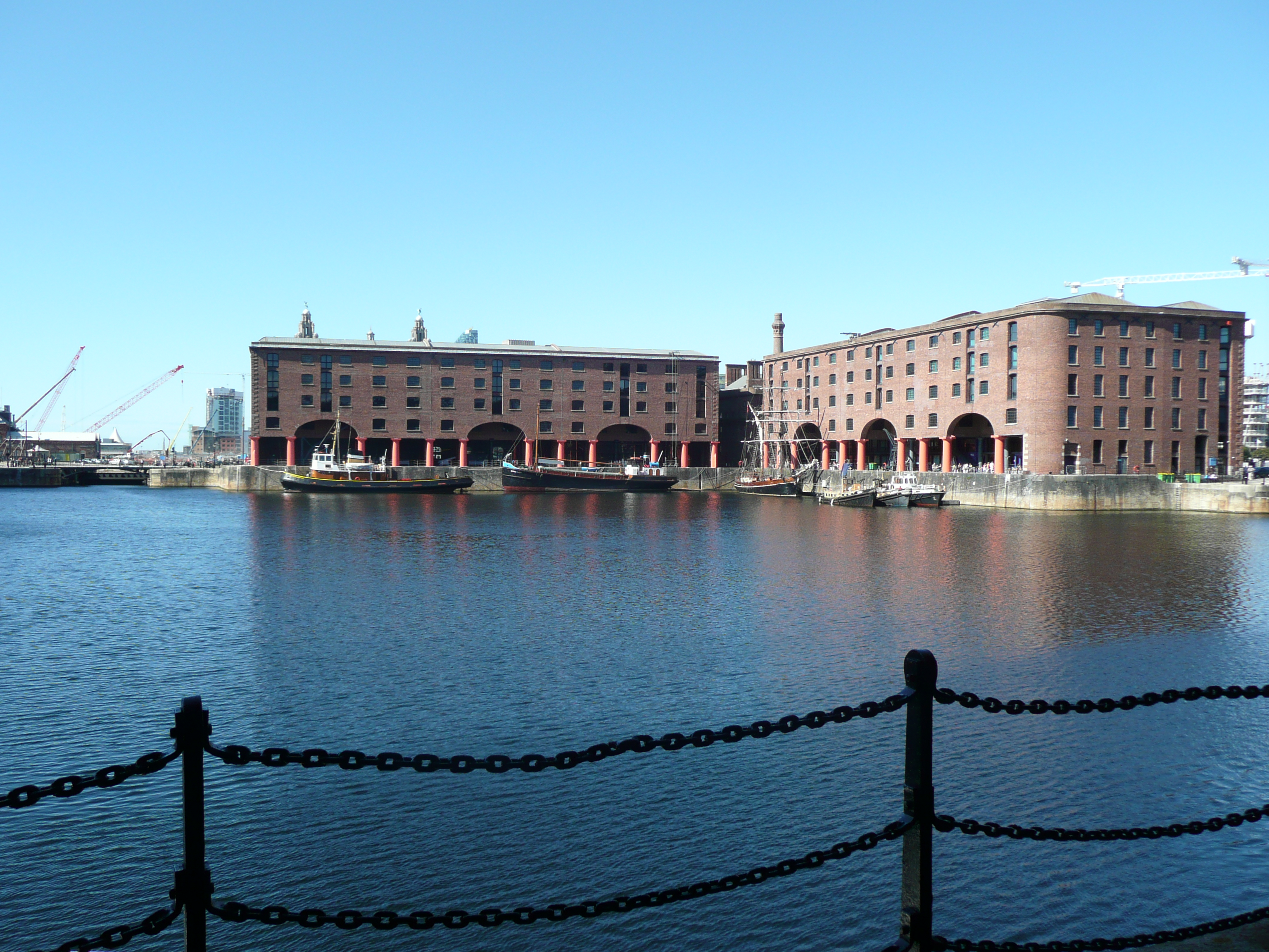 Альберт-док у Ліверпулі